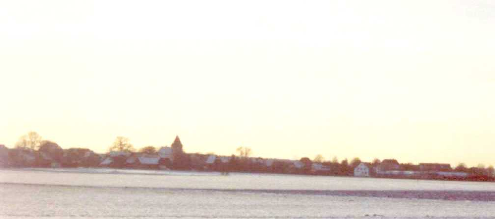 Kirchwehren aus Richtung Döteberg im Osten. Aus dem Ortsbild tritt die Kirche als Namensgeber deutlich hervor.